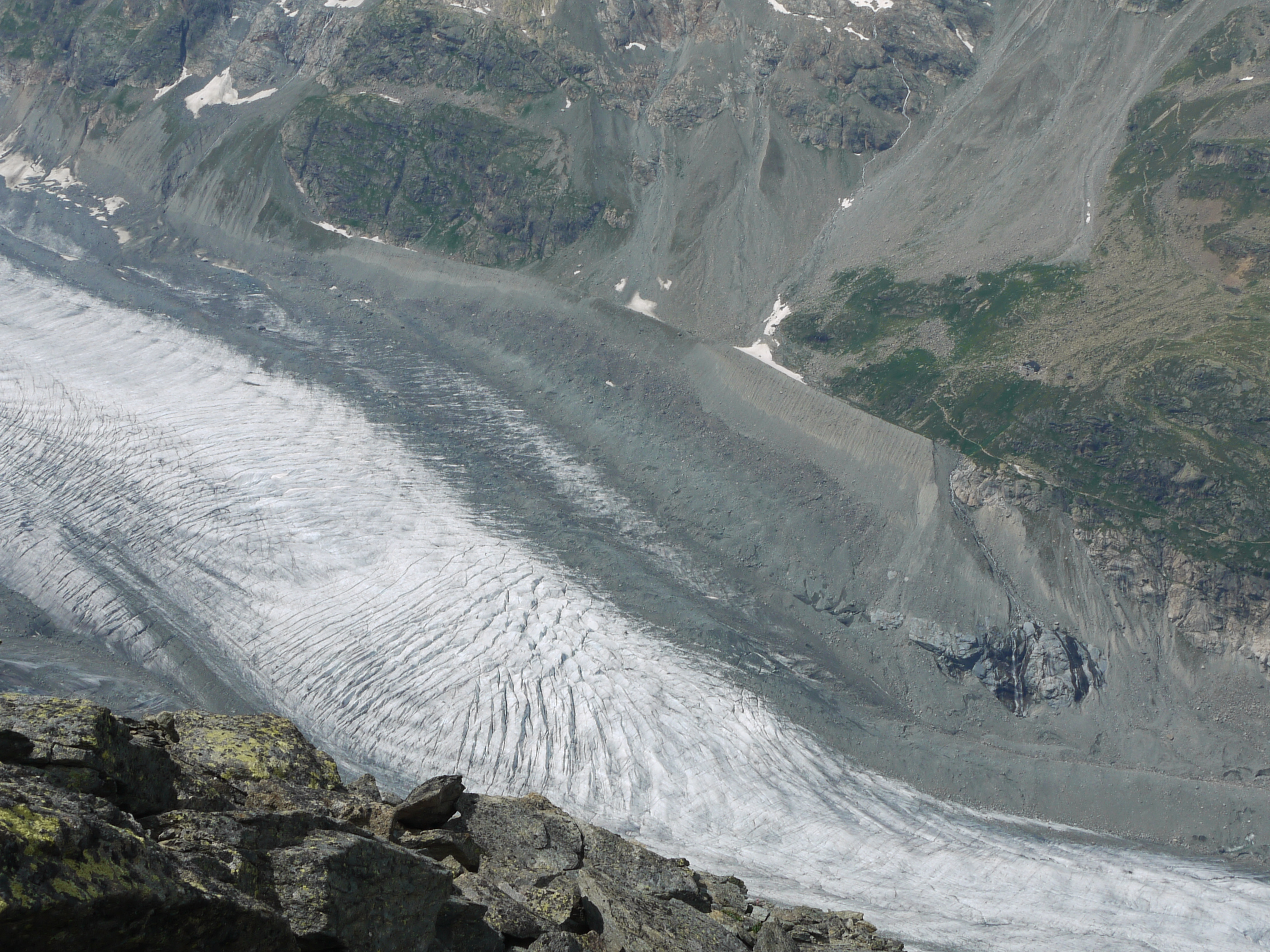 Bovalhütte 2495m mit Morteratschgletscher vom Munt Pers aus gesehen